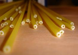 Bucatini